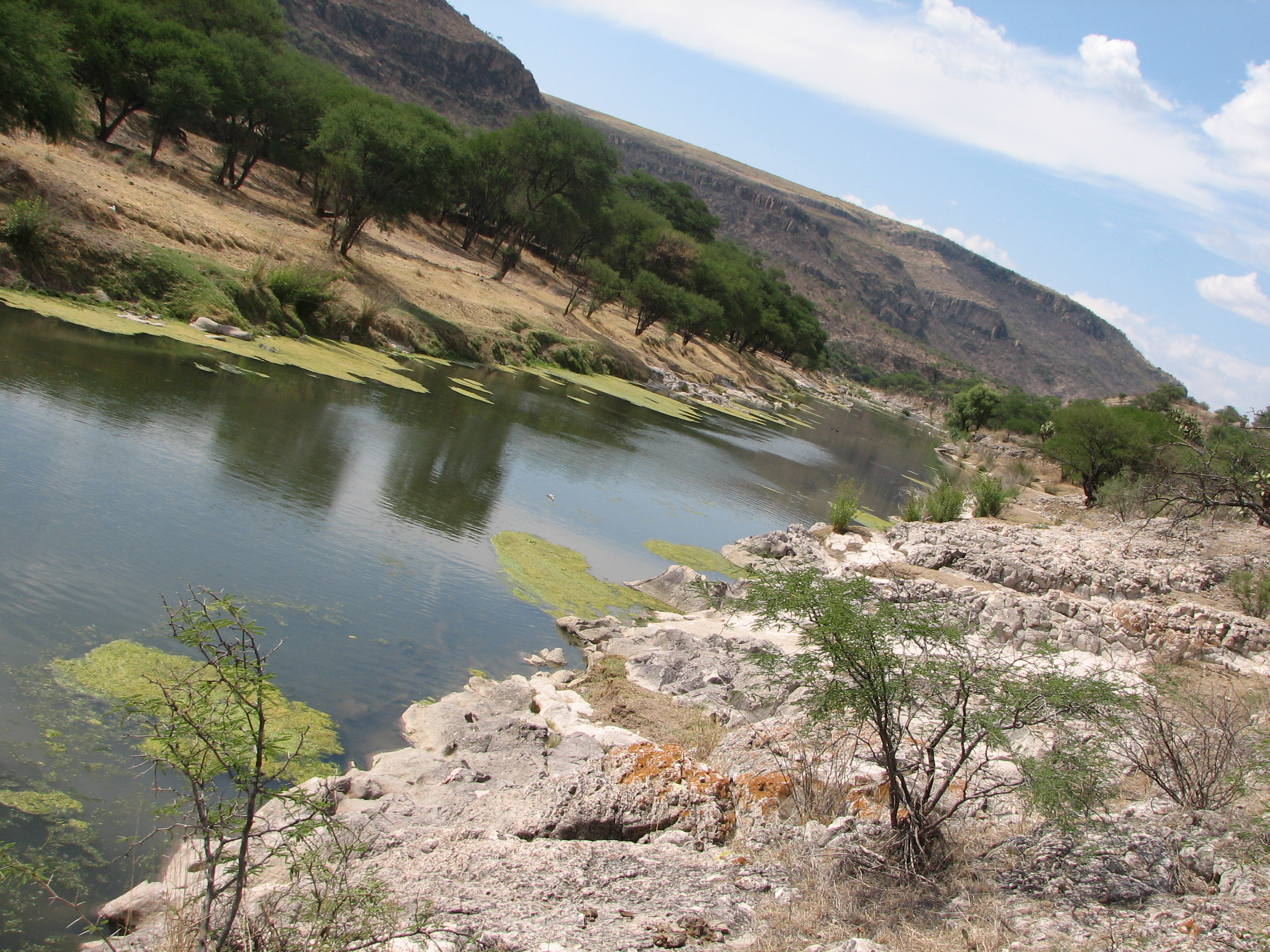 Rio de Totatiche